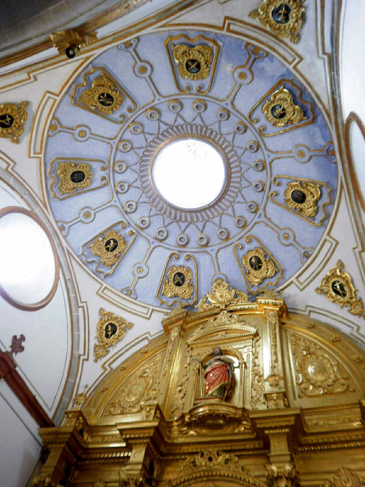 Catedral de la Asunción de de Coria (provincia de Cáceres). Capilla de las Reliquias